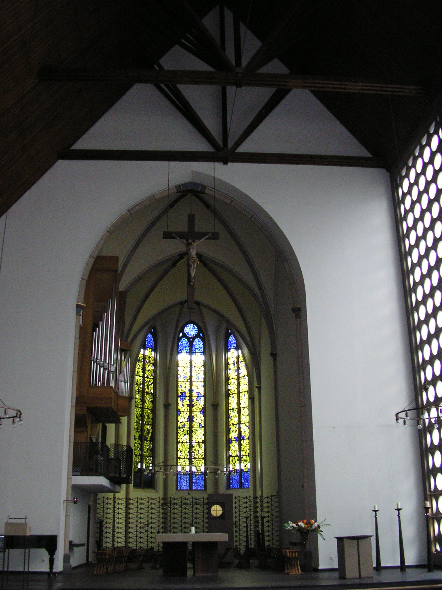 Duisburg Karmelkirche. Blick zum Chor der alten Minoritenkirche